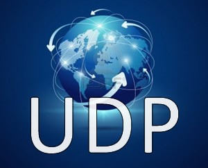 Монгол: Зураг